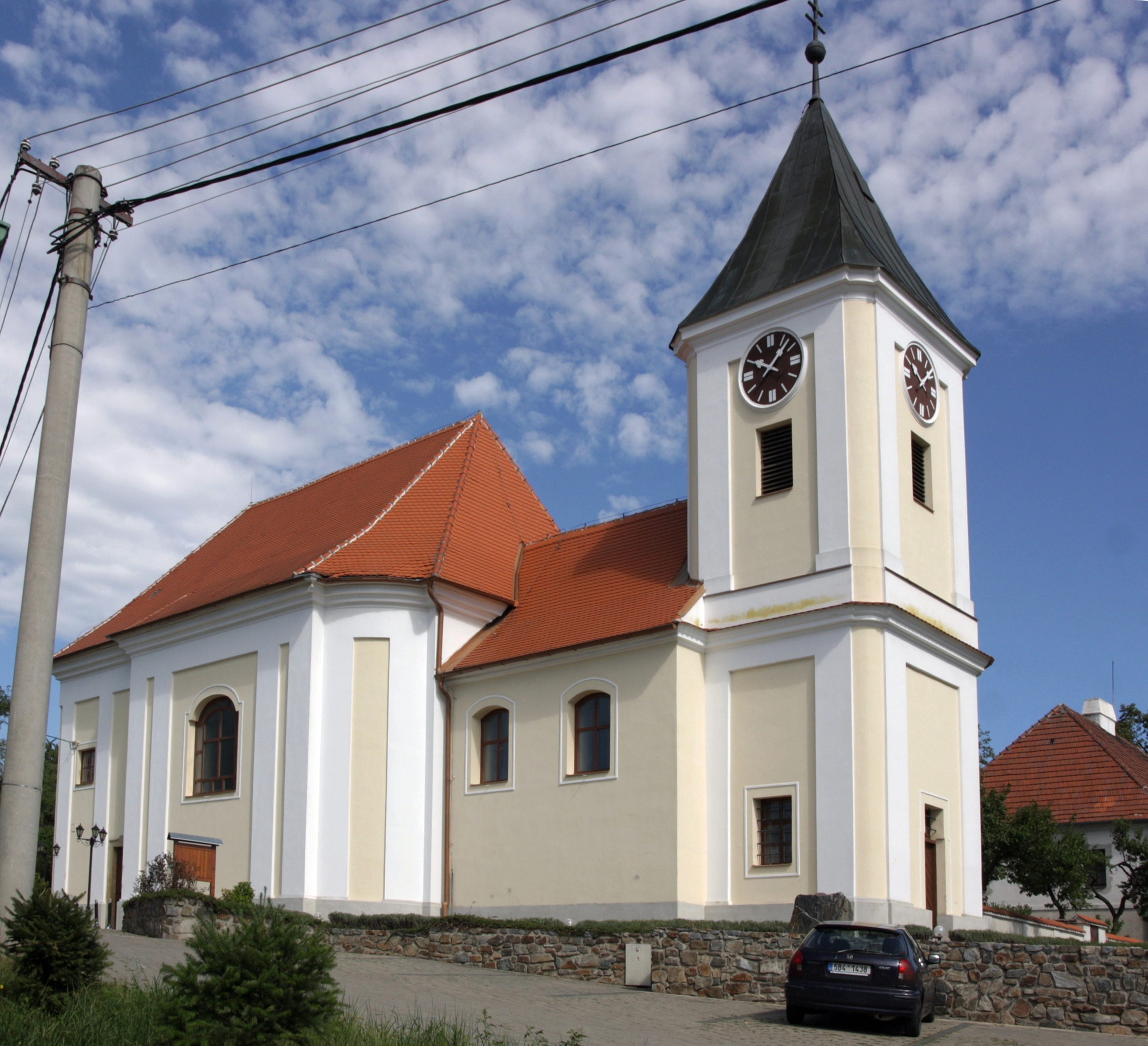 Čučice - kostel svatého Jakuba Staršího, pohled od JV